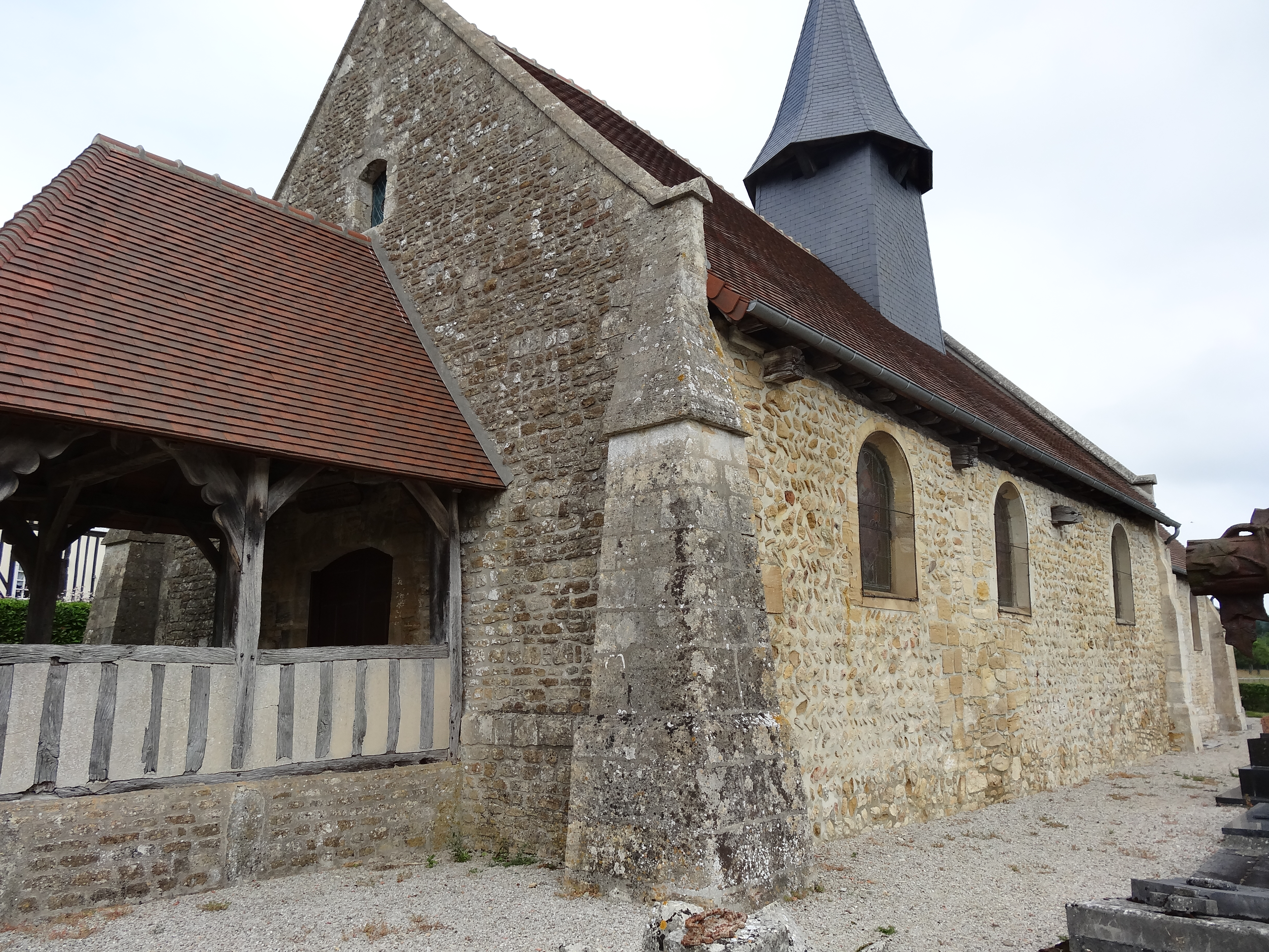 Montreuil-en-Auge (14) la façade sud de la nef de l'église est largement appareillée en arête-de-poisson